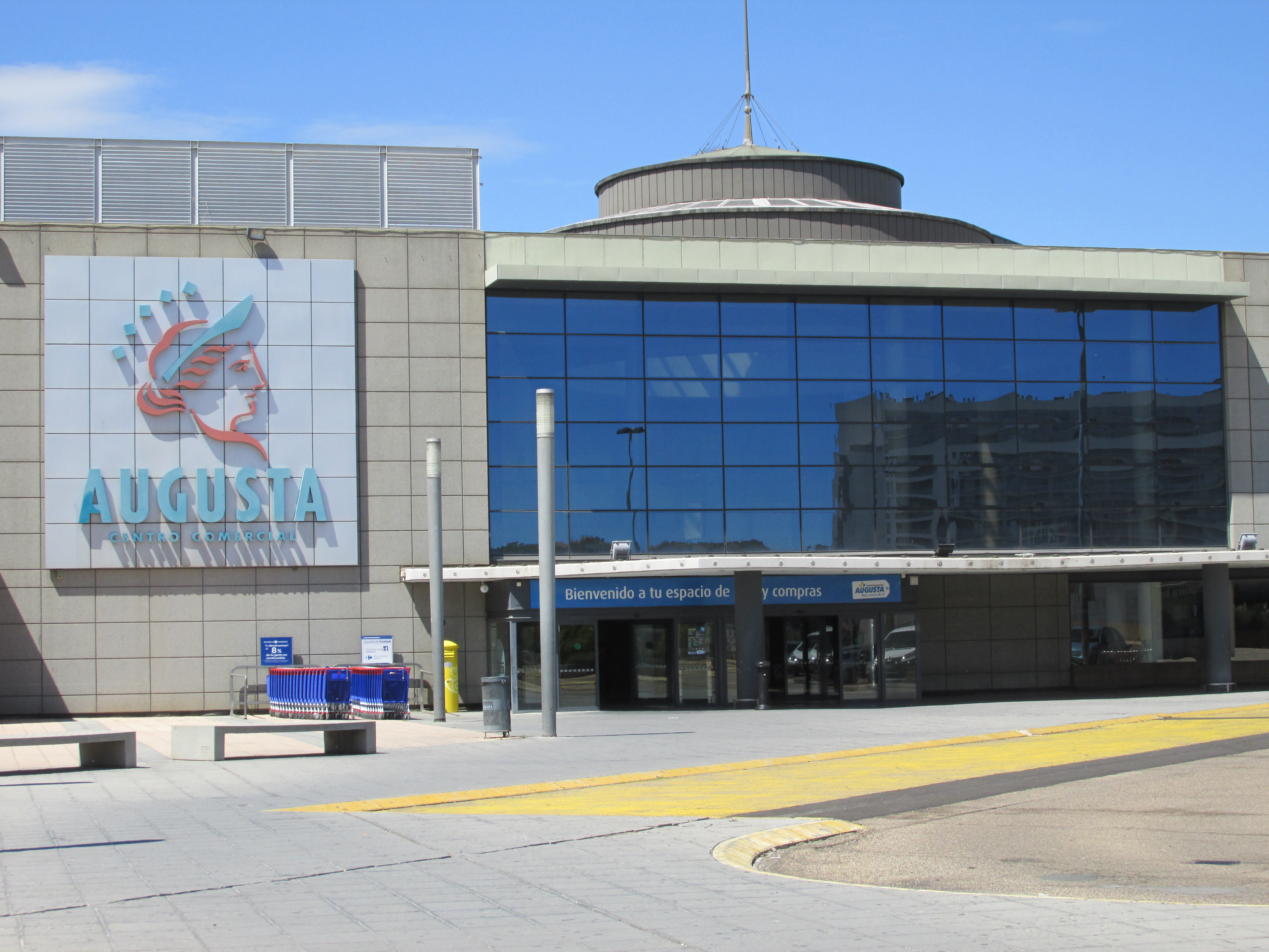 El Centro Comercial Augusta en Zaragoza, España.